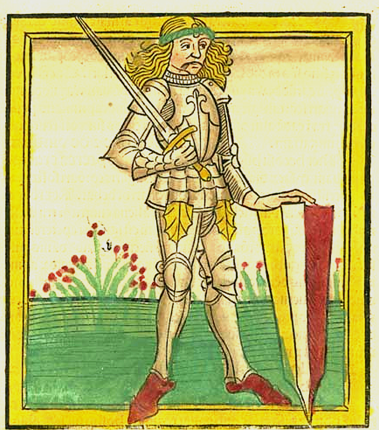 Tucrcoczy Janos Iancu de Hunedoara Brunnner Ausgabe